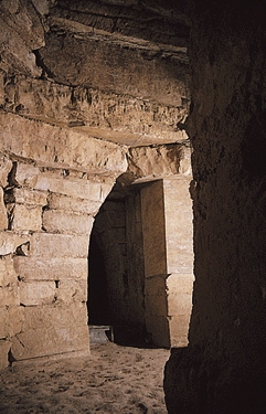 Tomba Etrusca del VII secolo a.C. Tholos di Sesto Fiorentino - conosciuta come "La Montagnola" Foto realizzata autonomamente